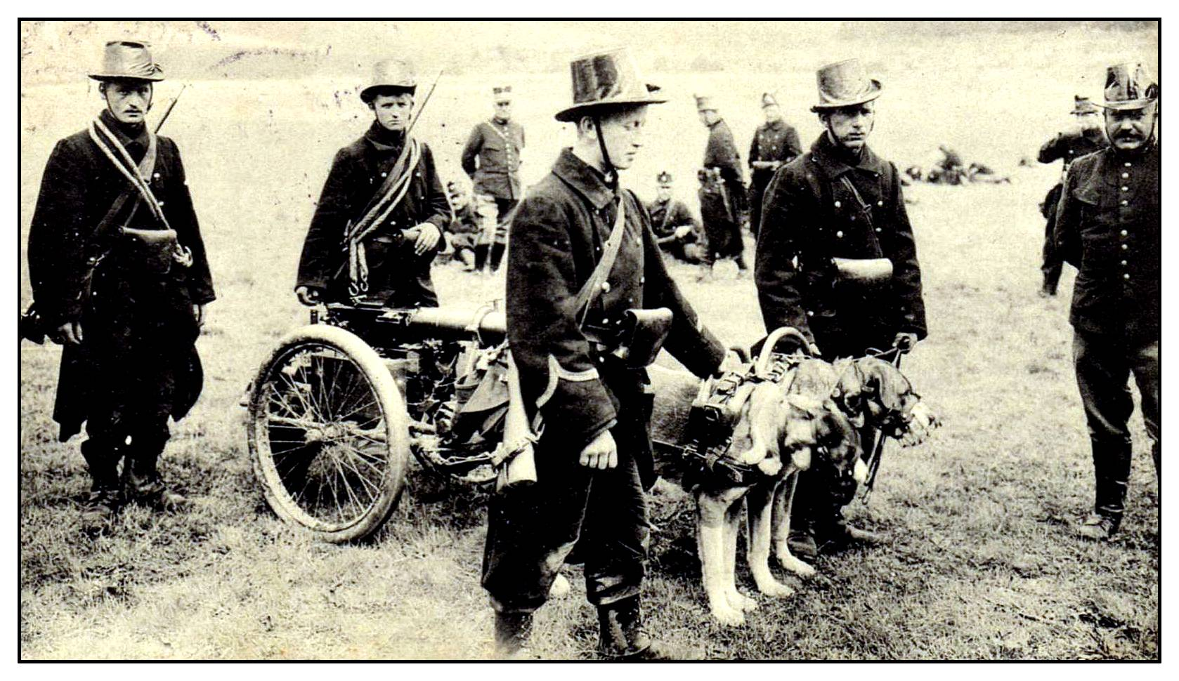 Chien attelage armée belge, mitrailleuse Maxim